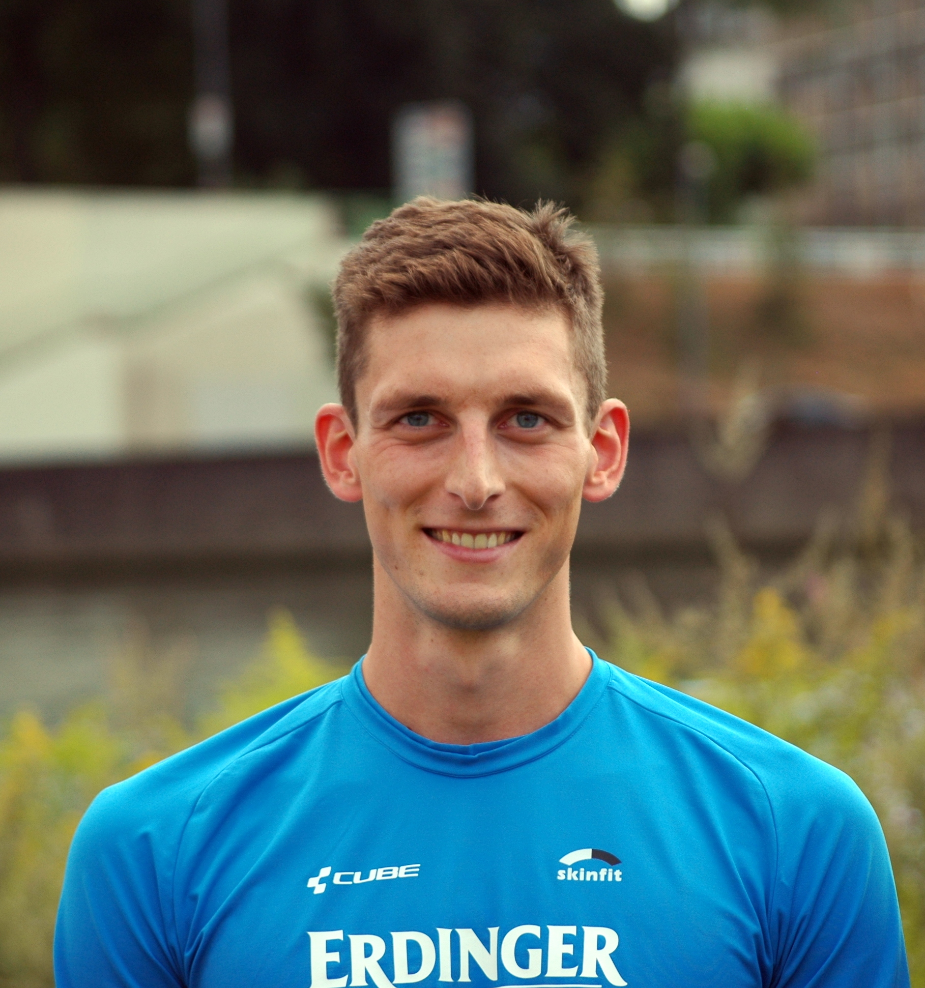 HeidelbergMan 2015: Florian Angert